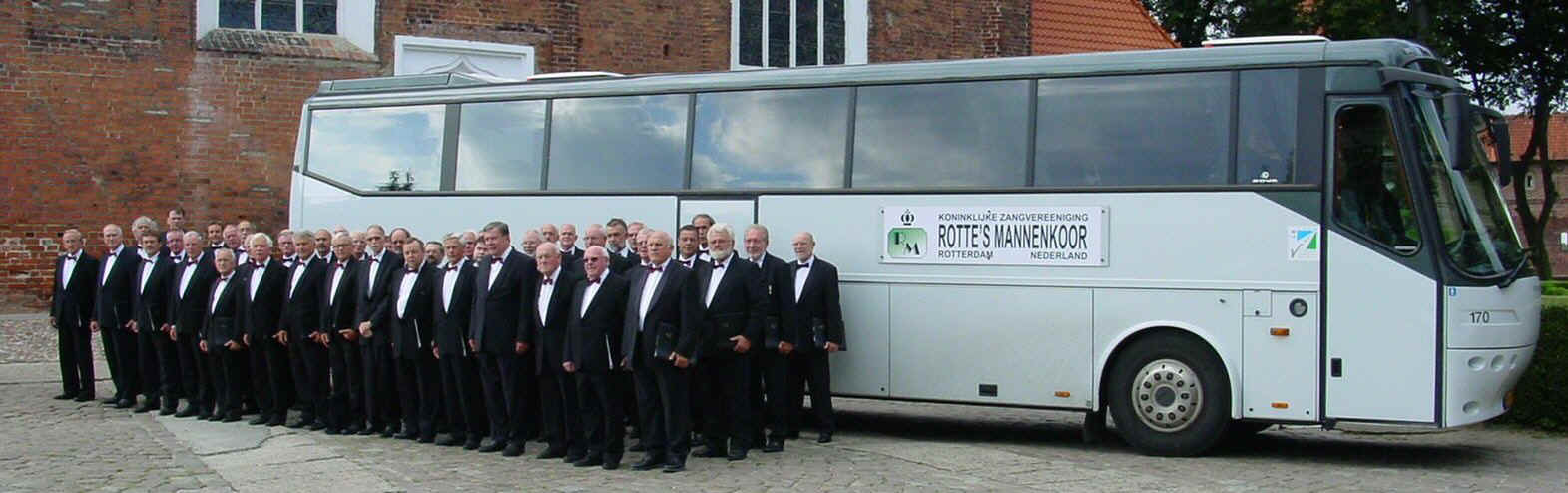 De Koninklijke Zangvereeniging Rotte's Mannenkoor on tour in Polen, 2004